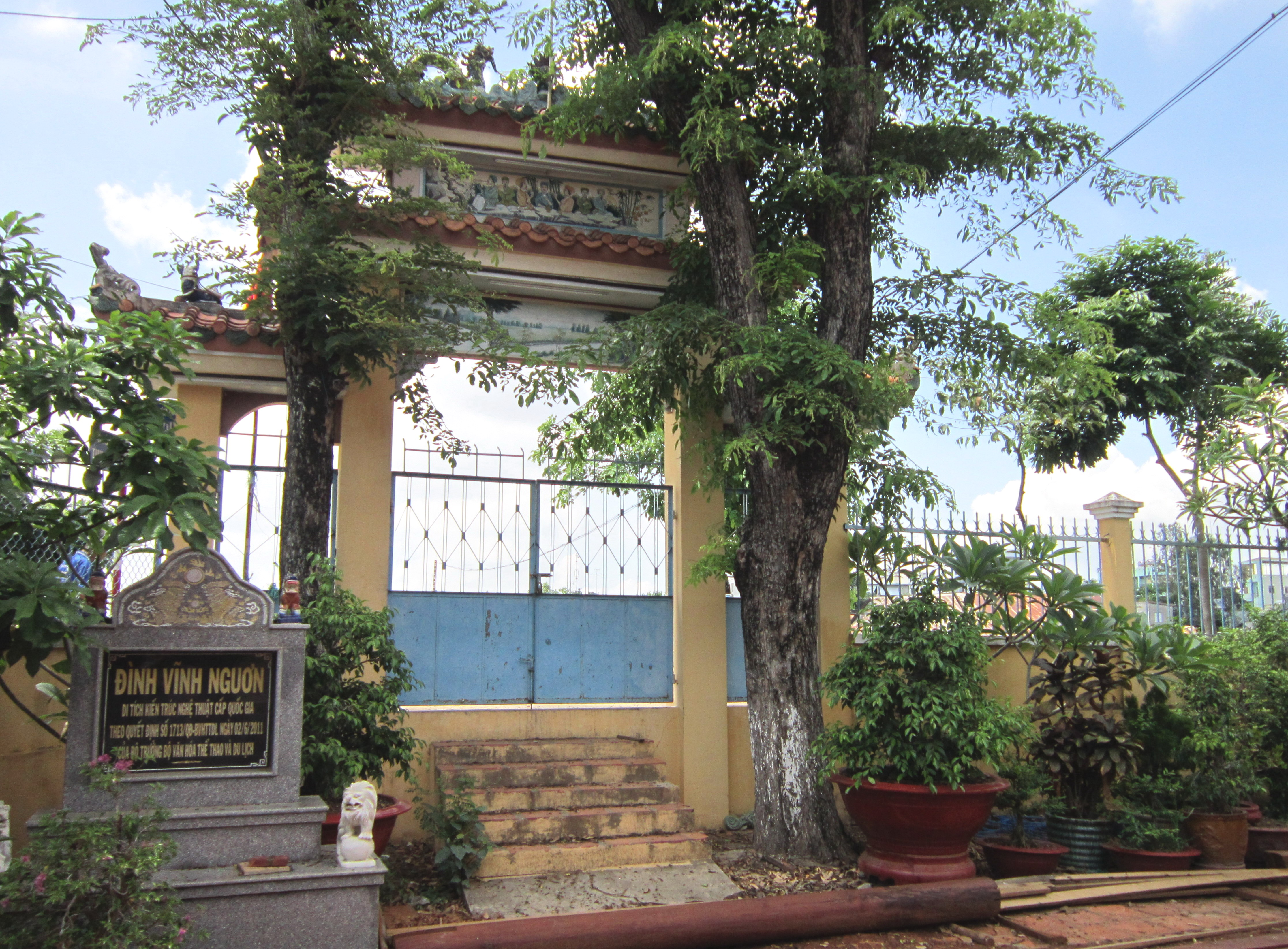 Bia công nhận di tích đình Vĩnh Ngươn tại xã Vĩnh Ngươn, thị xã Châu Đốc, tỉnh An Giang, Việt Nam.